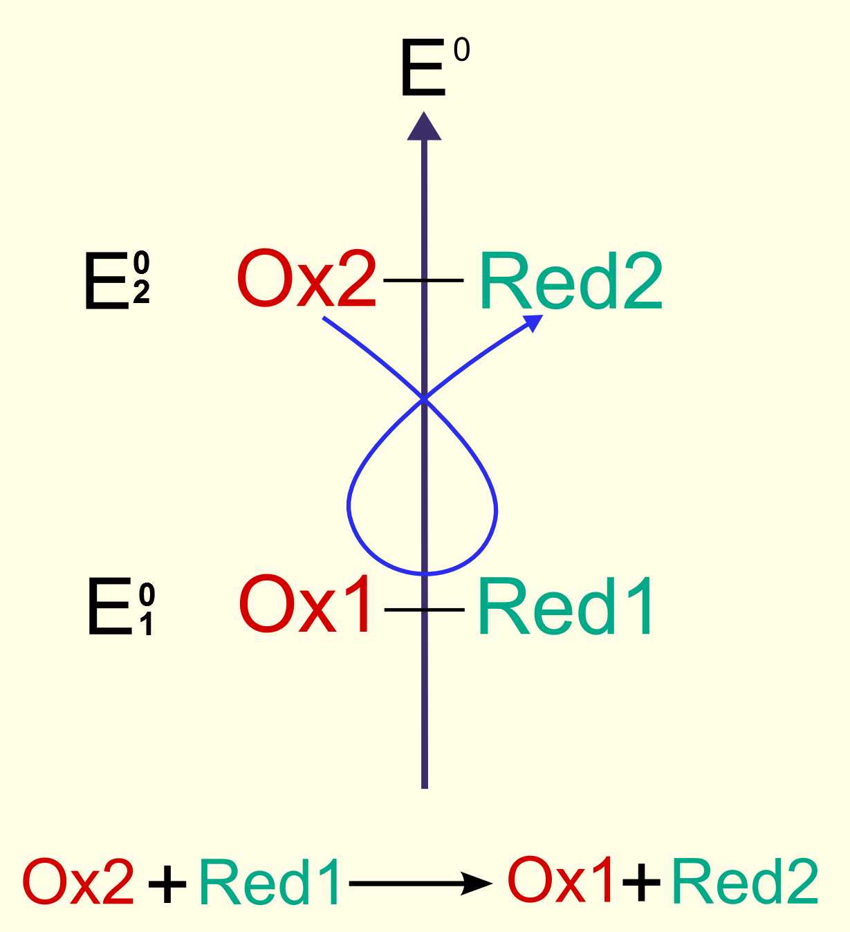 Prévision du sens d'une réaction d'oxydo-réduction en utilisant la règle du gamma.